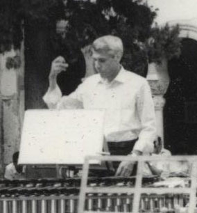 Un concerto diretto da Antonio Buonomo